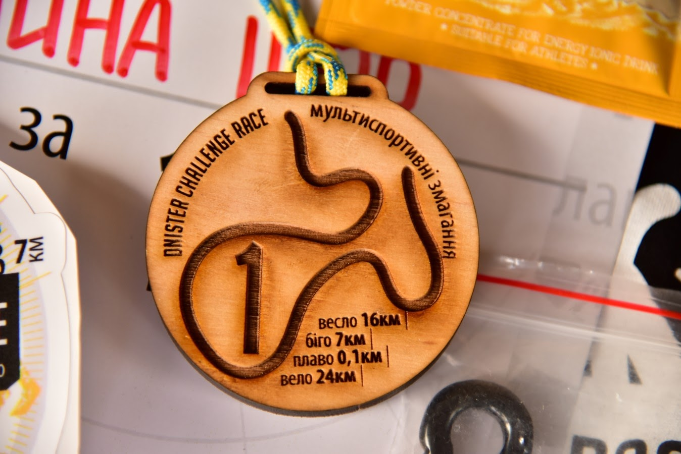 Дерев'яна нагорода за І місце